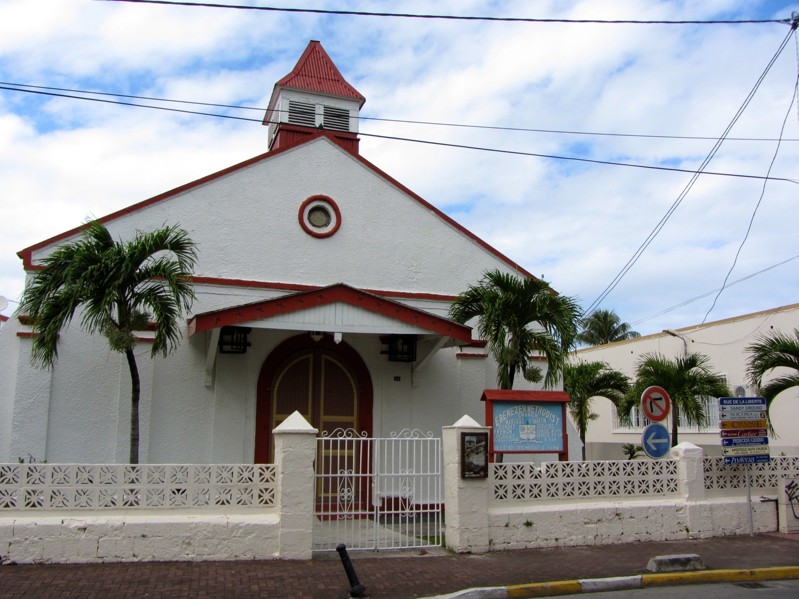 Ebenezer Methodist Marigot Church